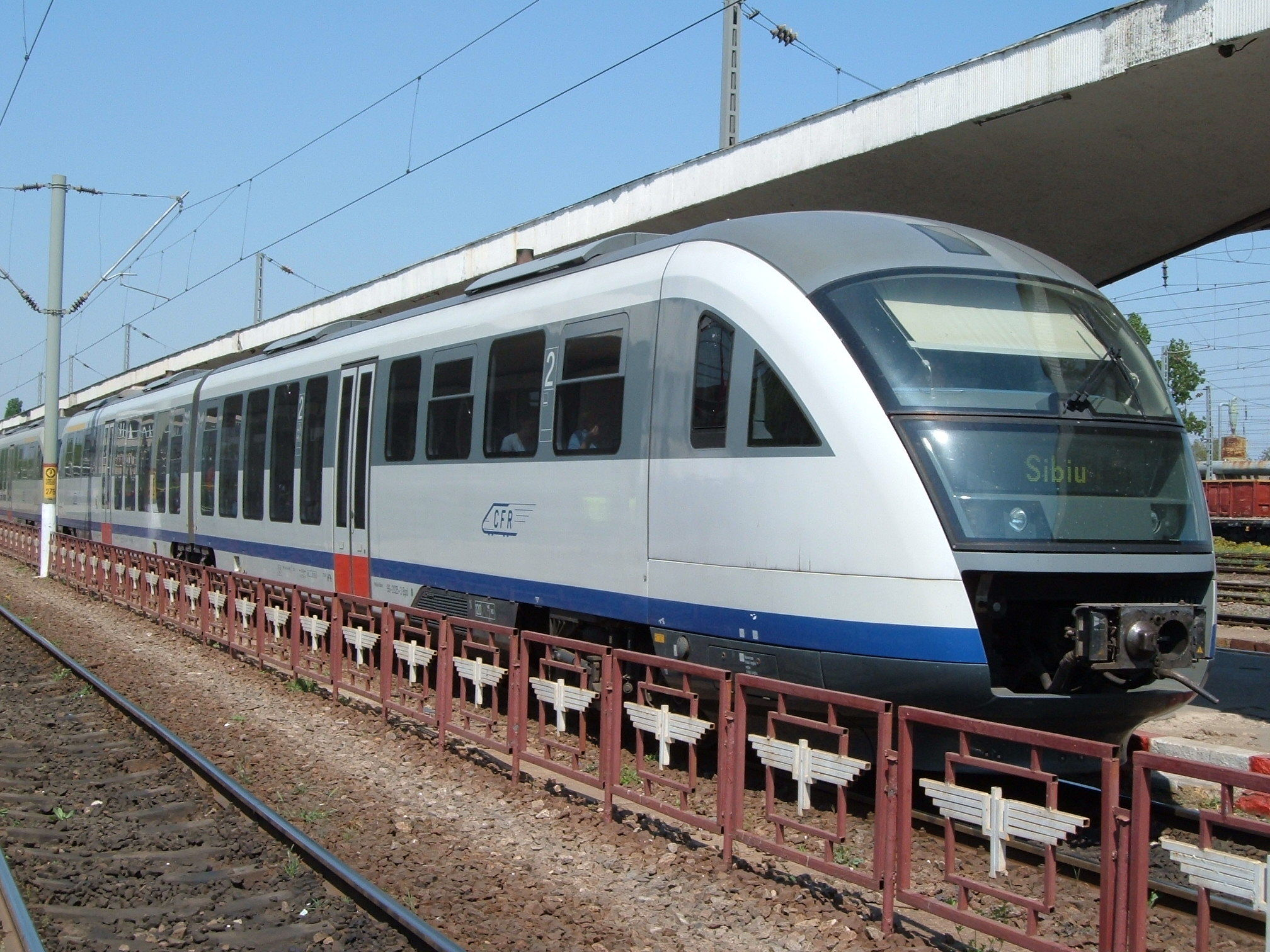 Atomotor Desiro în compunerea trenului Personal Craiova-Sibiu.